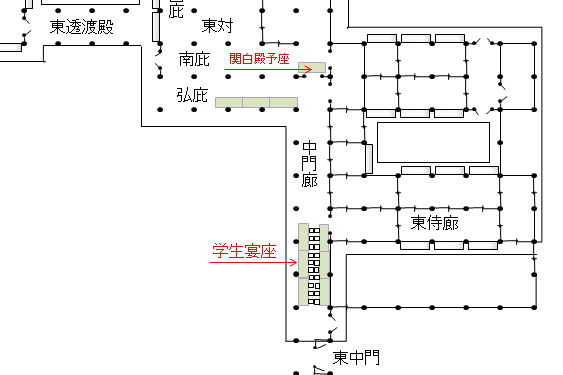 東三条殿・東中門廊、学生参賀指図。『台記』保延2年12月21日条より作成。